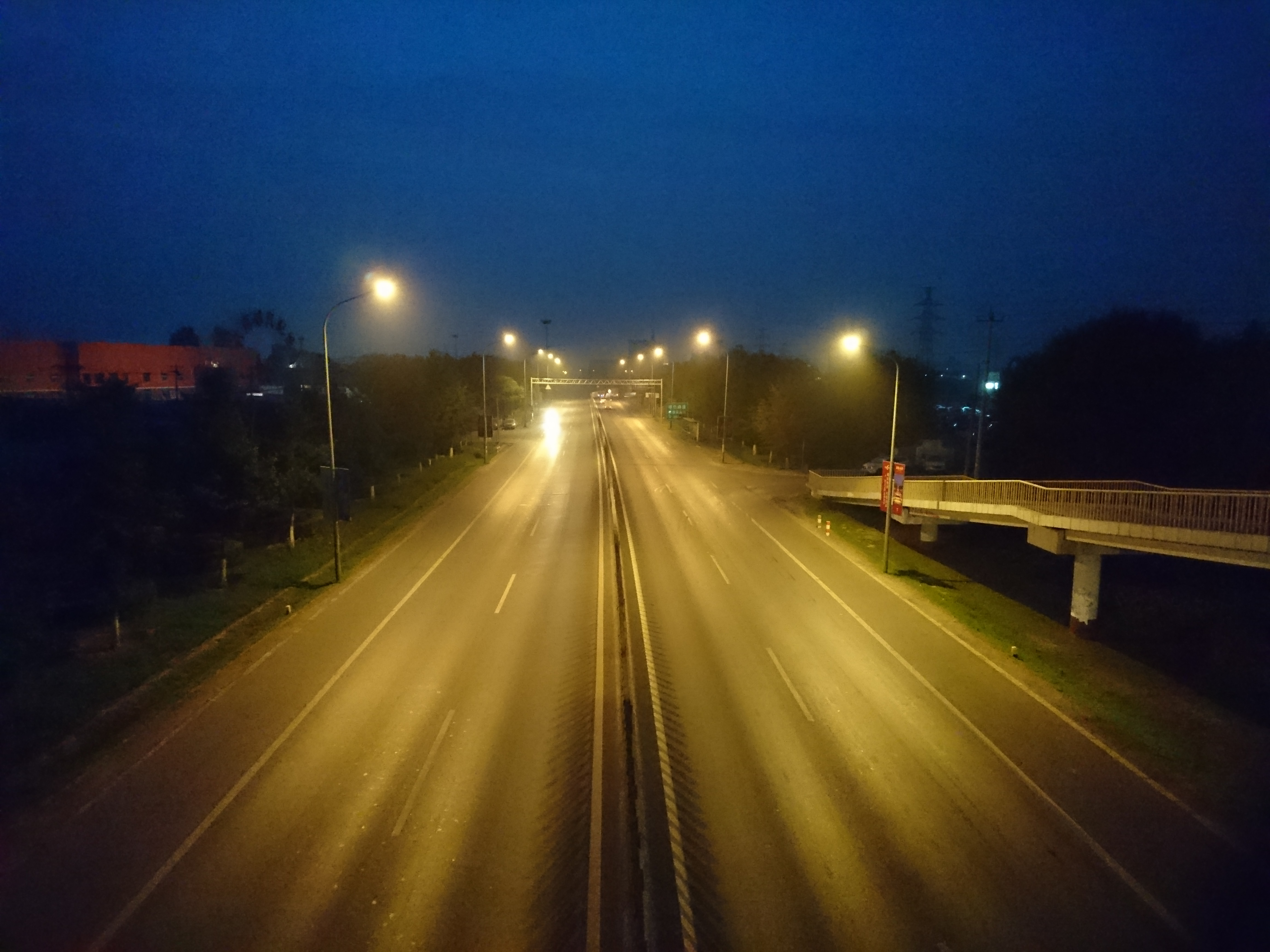 良郷と周口店を結びの京周路